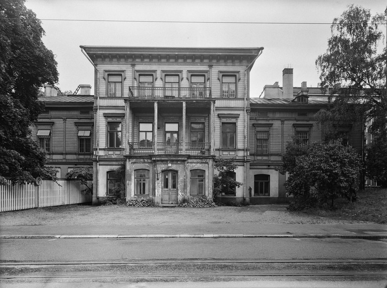 Kammion sairaskoti, Ruusulankatu 6-8.